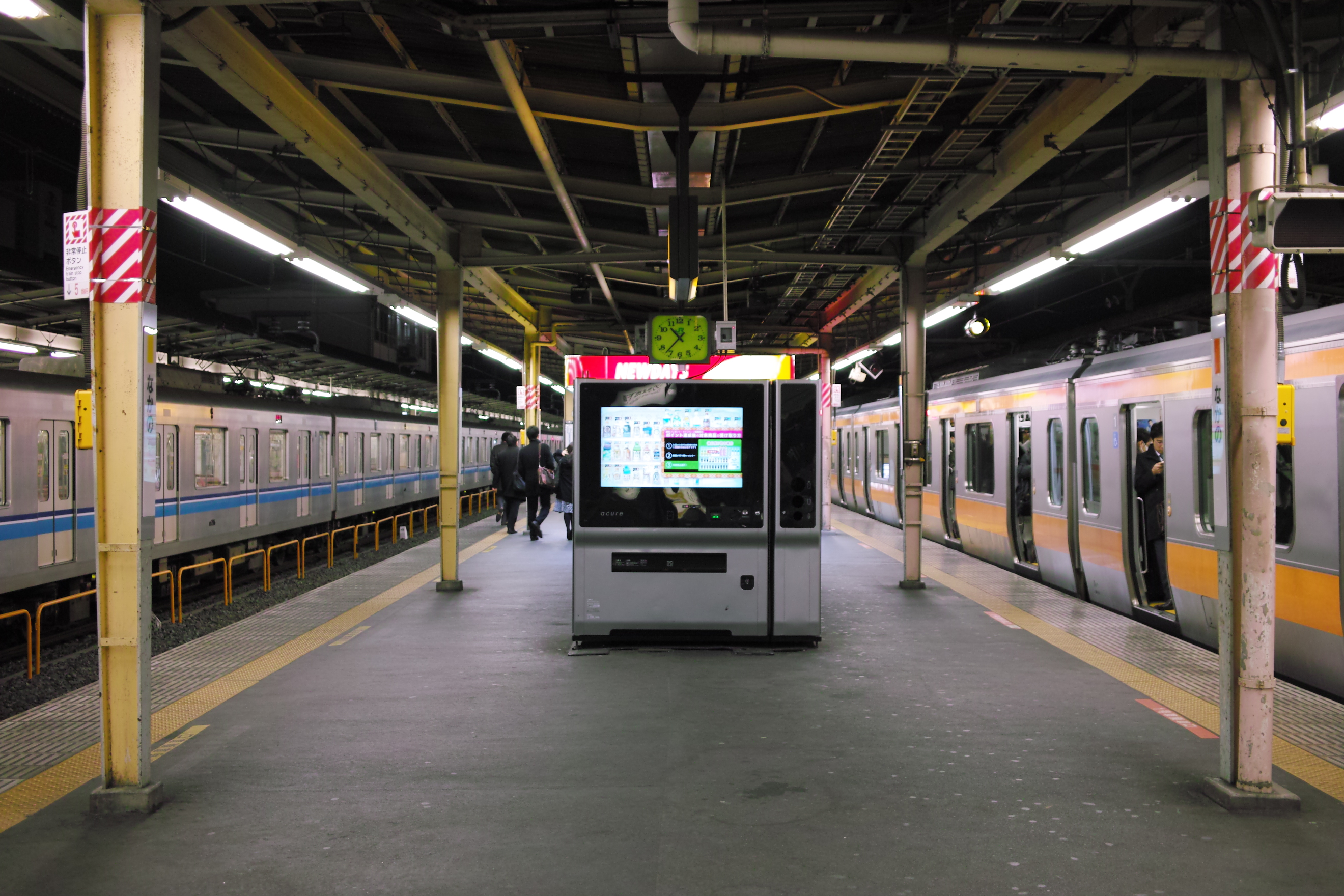 나카노 역 승강장